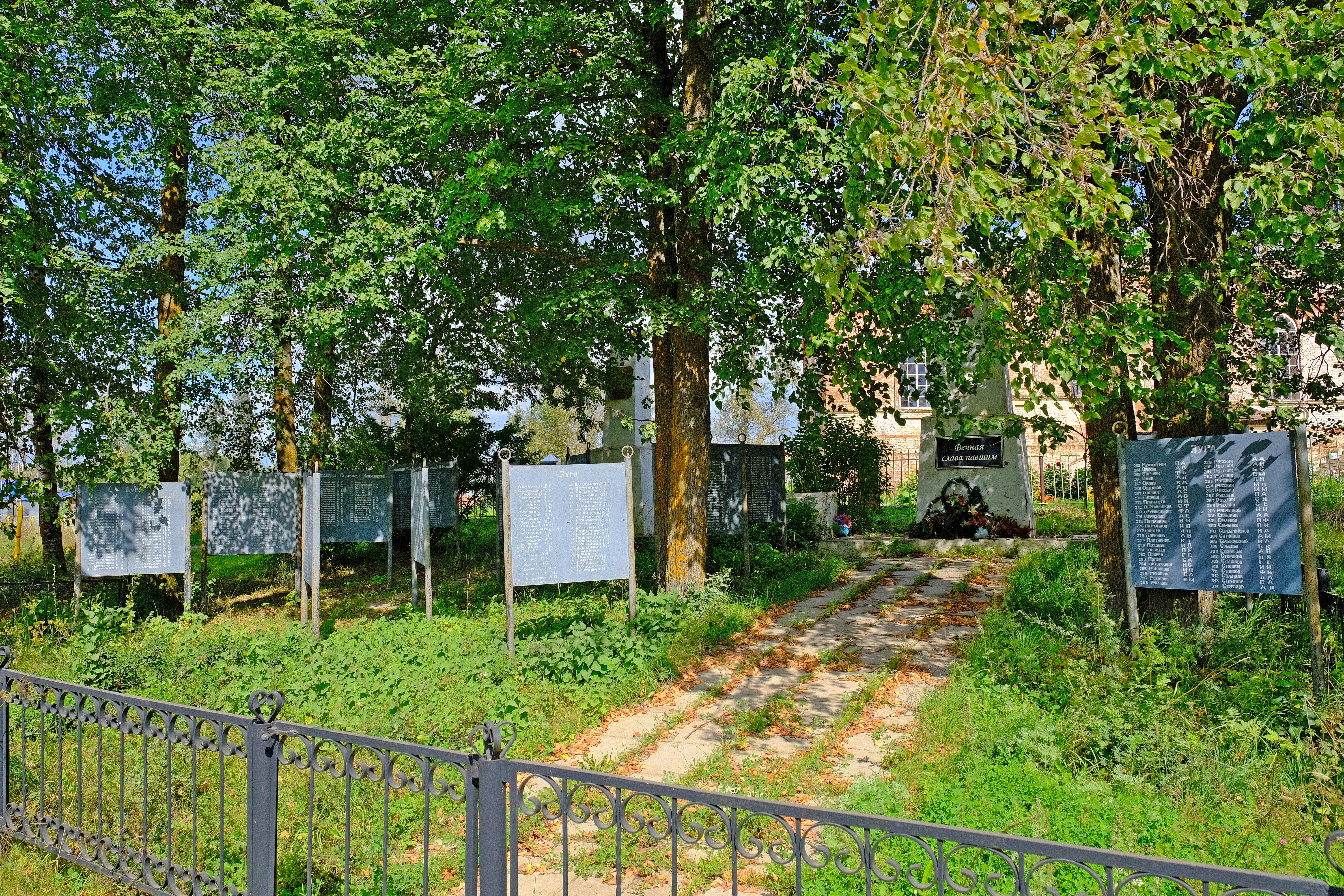 Мемориал погибшим в Великой Отечественной войне в селе Зура